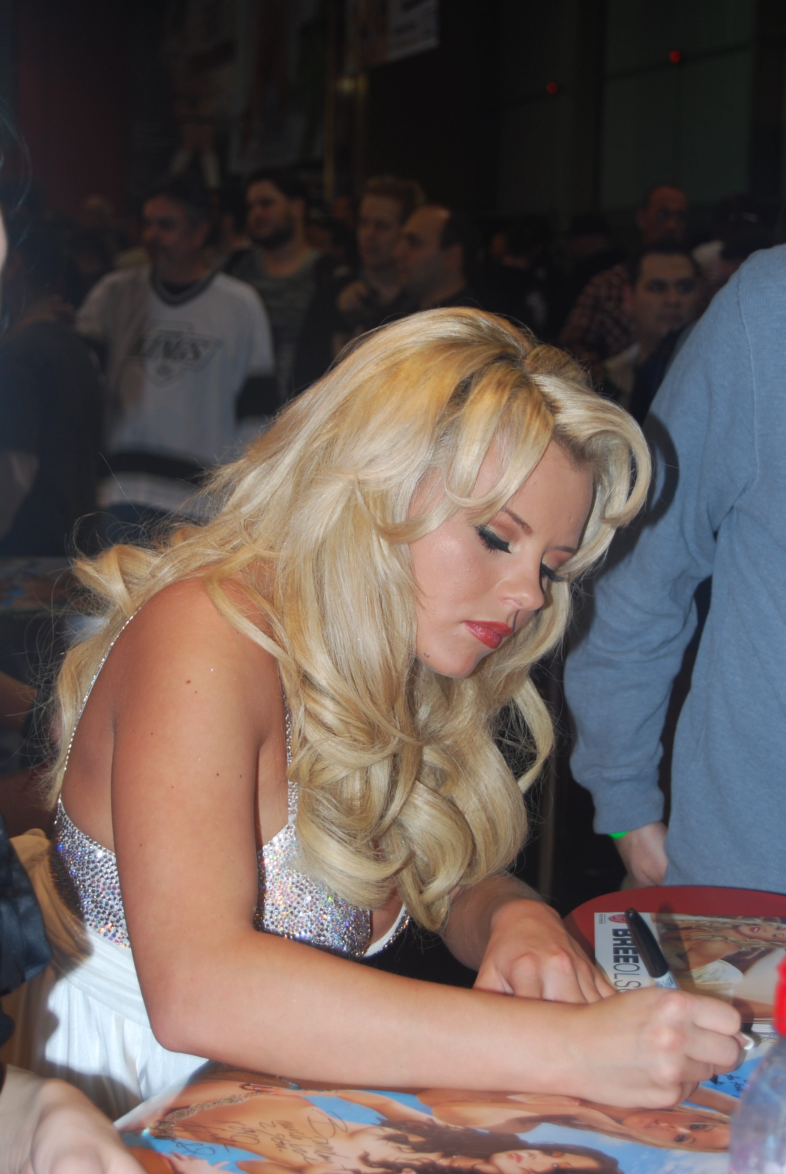 AEE2008_Nikon_Day2 467